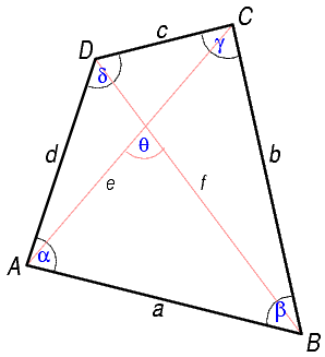 Чотирикутник